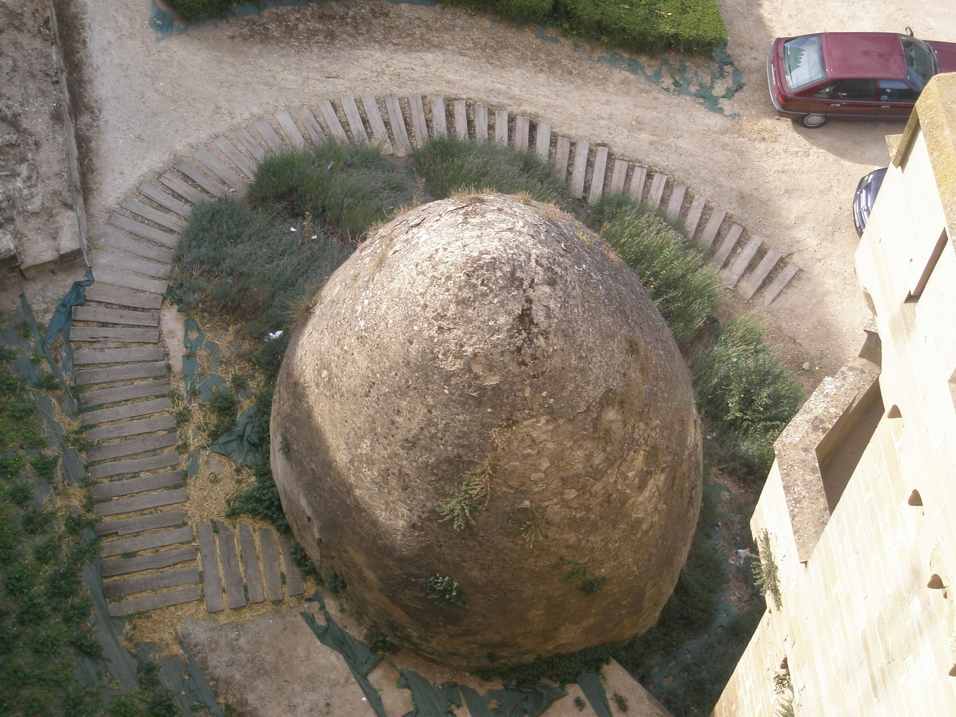 Nevera de hielo del palacio de Olite